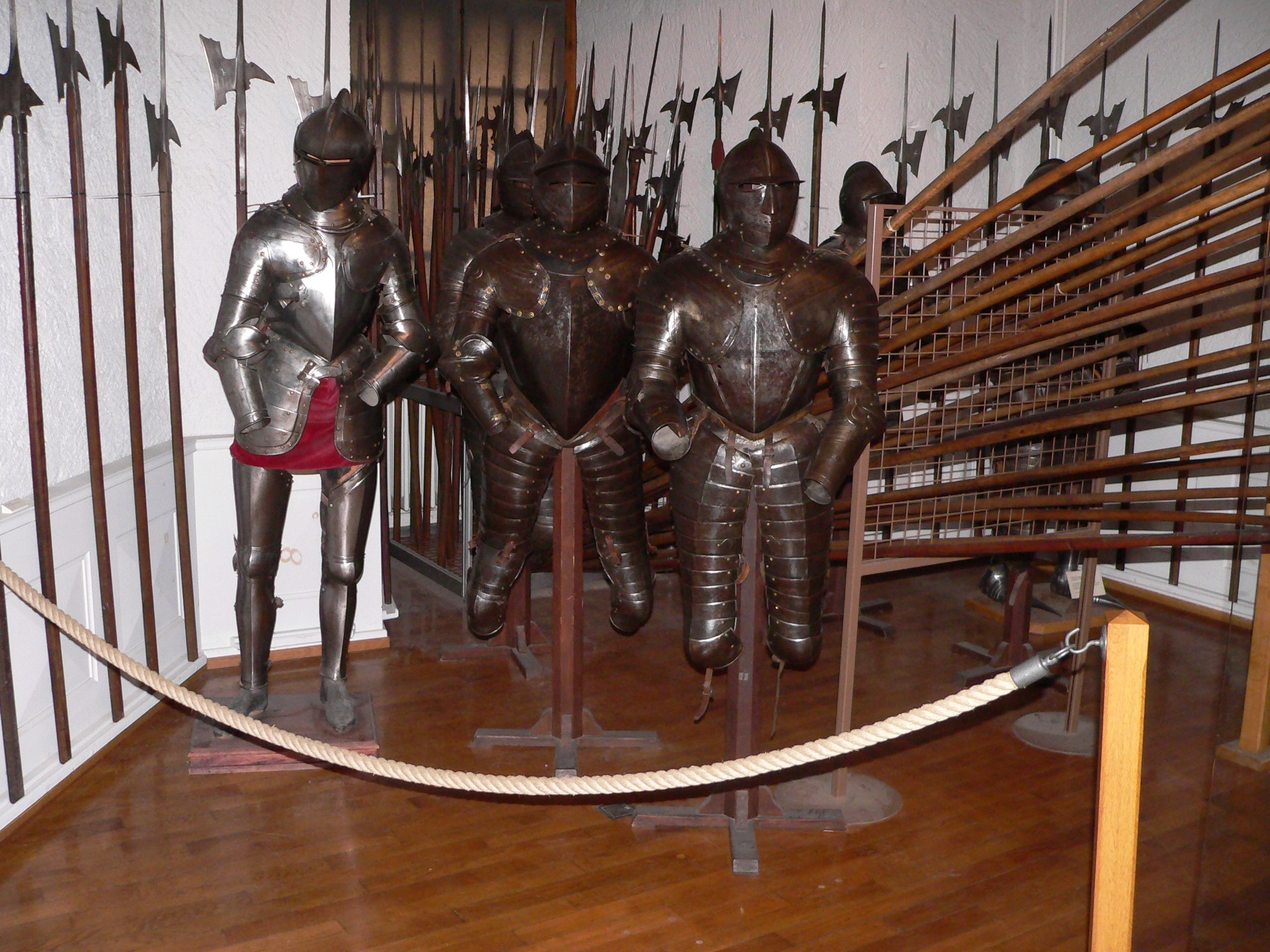 Diverses armures, hallebardes et autres accessoires. Musée du chateau de Morges, Suisse.